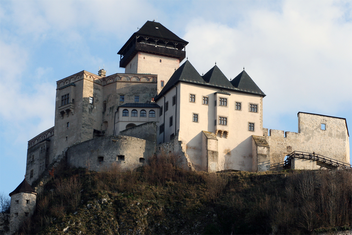 Trenčianska akropola